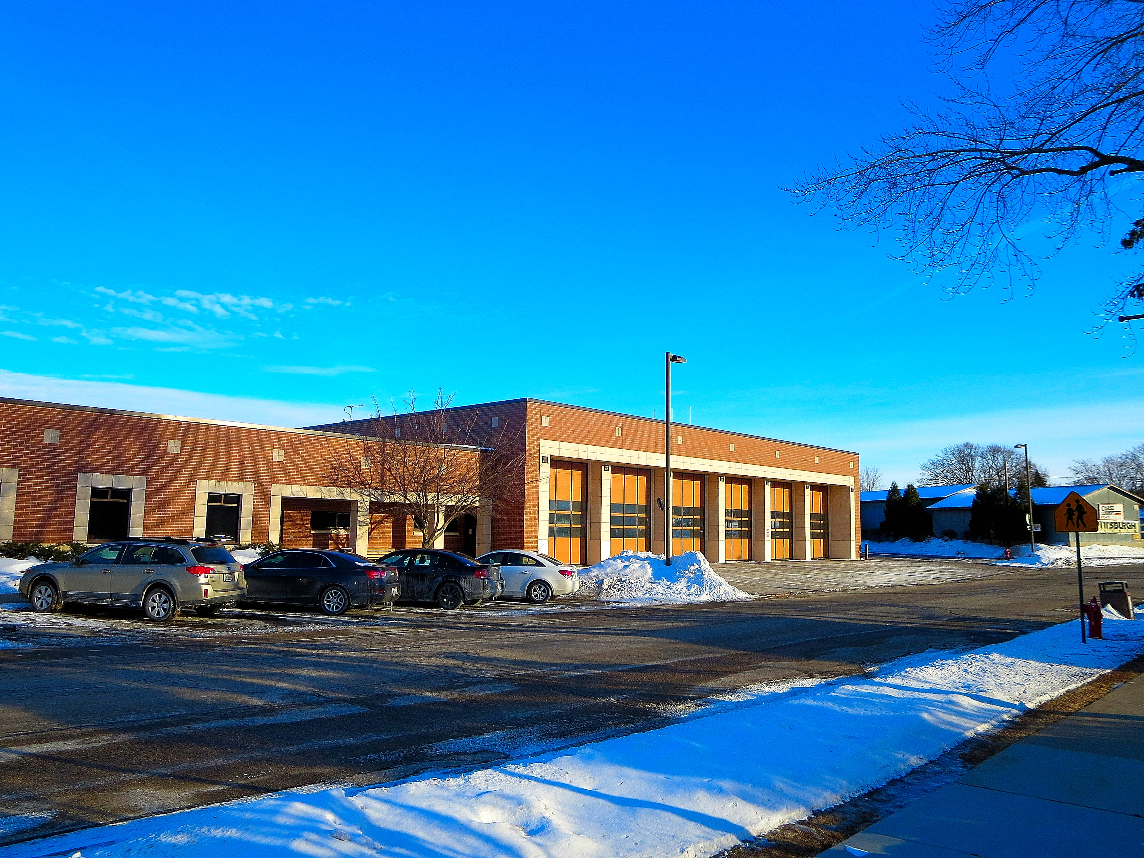 McFarland Fire Department